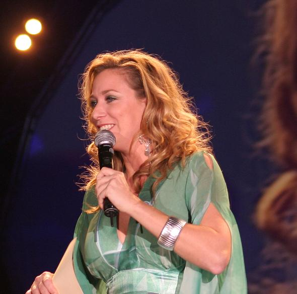 Fabienne de Vries, tno feest, 10 nov